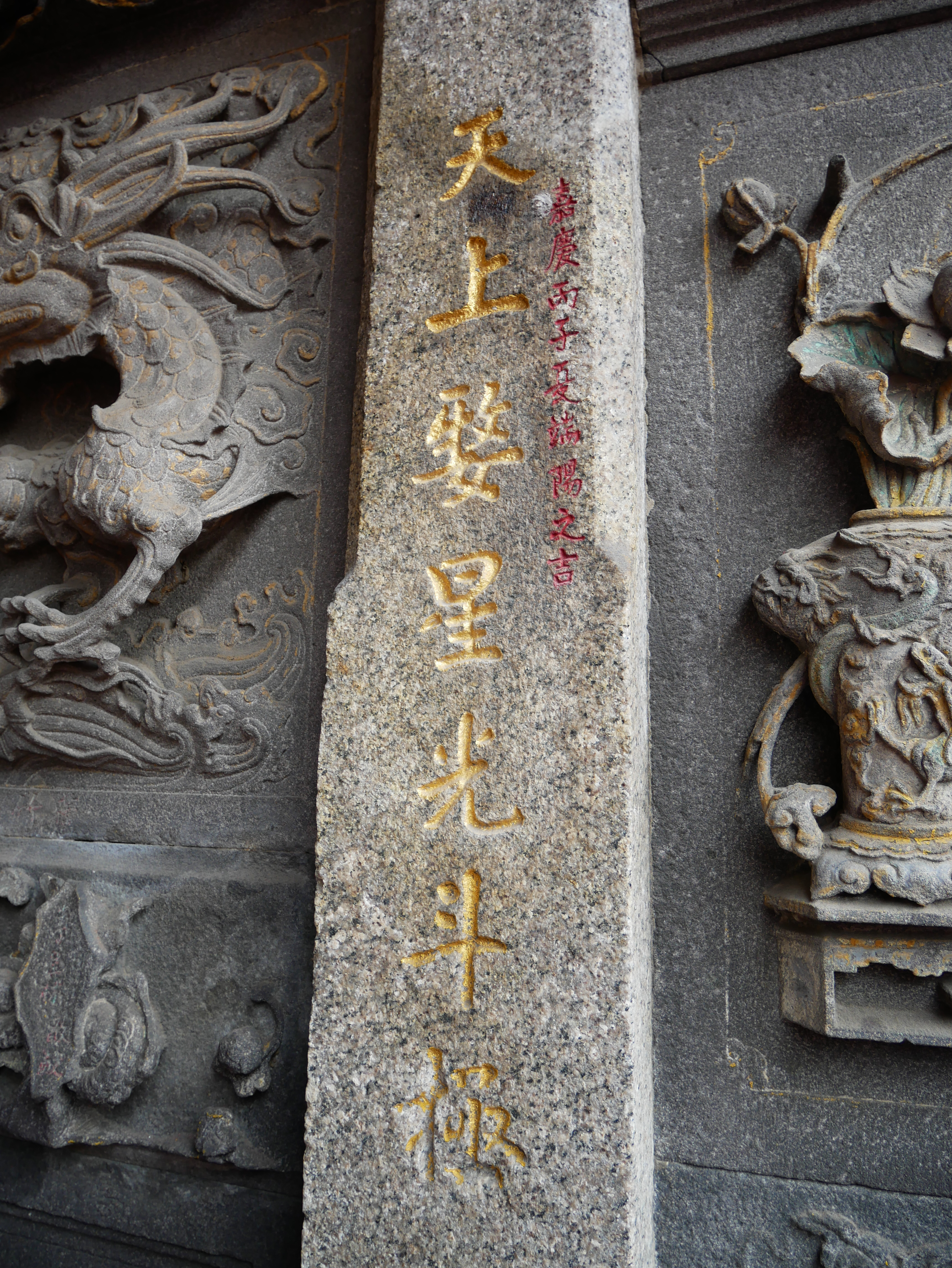 中文（台灣）: 中港慈裕宮三川殿「天上婺星光斗極」楹聯，苗栗縣竹南鎮中美里